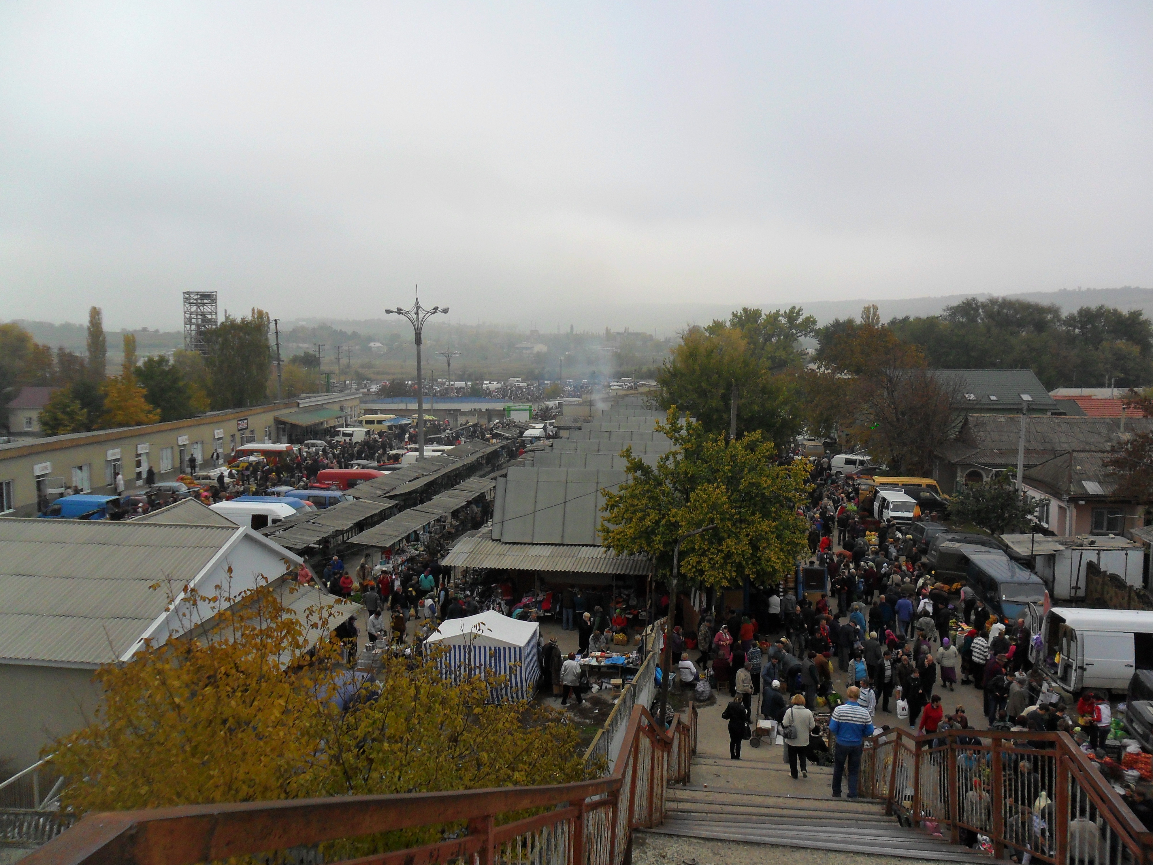 Zi de târg în orașul Strășeni